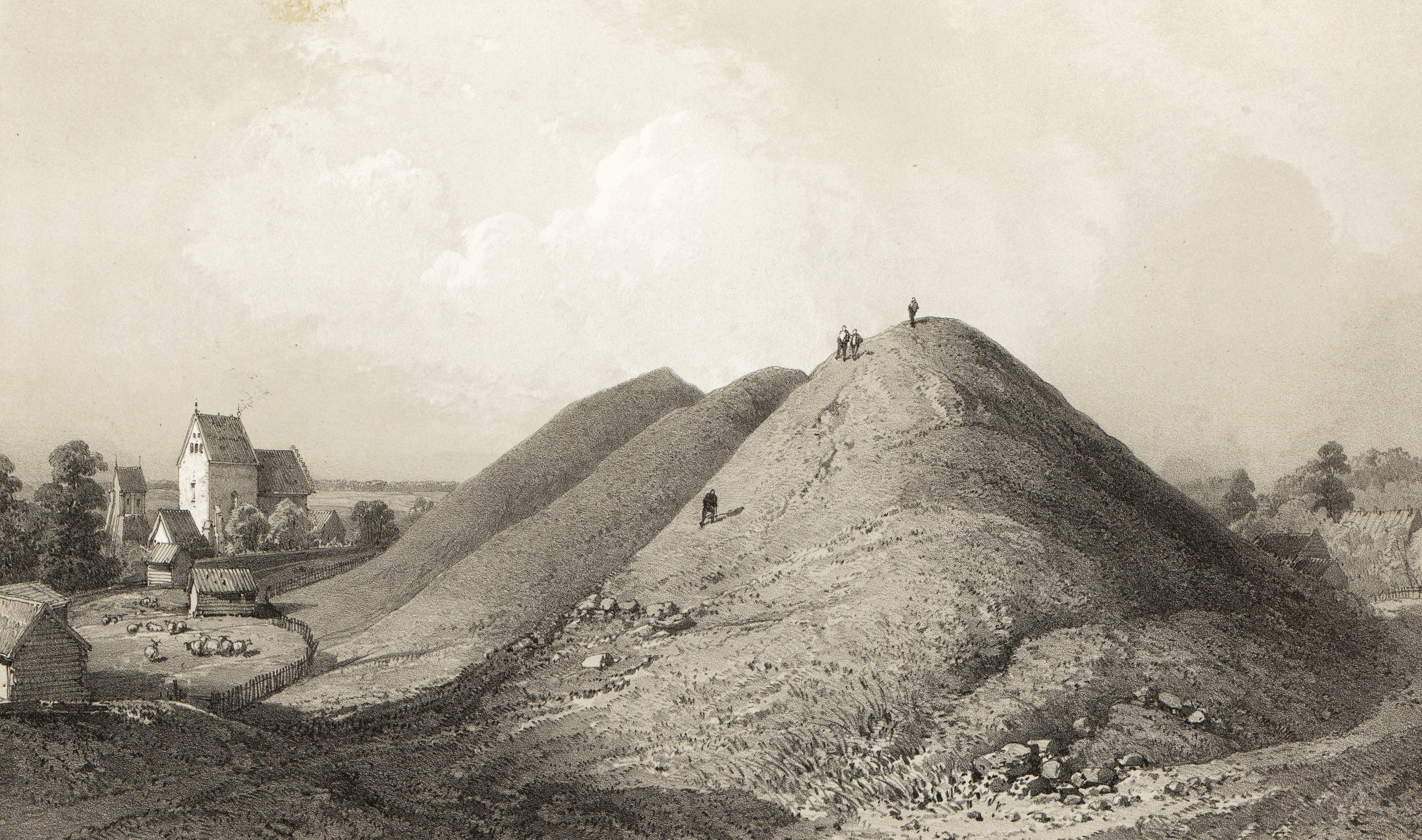 Illustrasjon hentet fra boken "Voyages de la Commission scientifique du Nord, en Scandinavie, en Laponie, au Spitzberg et aux Feröe" av ukjent forfatter og utgitt av Arthus BertrandParis : Arthus Bertrand, [1852] (Paris, [1852])